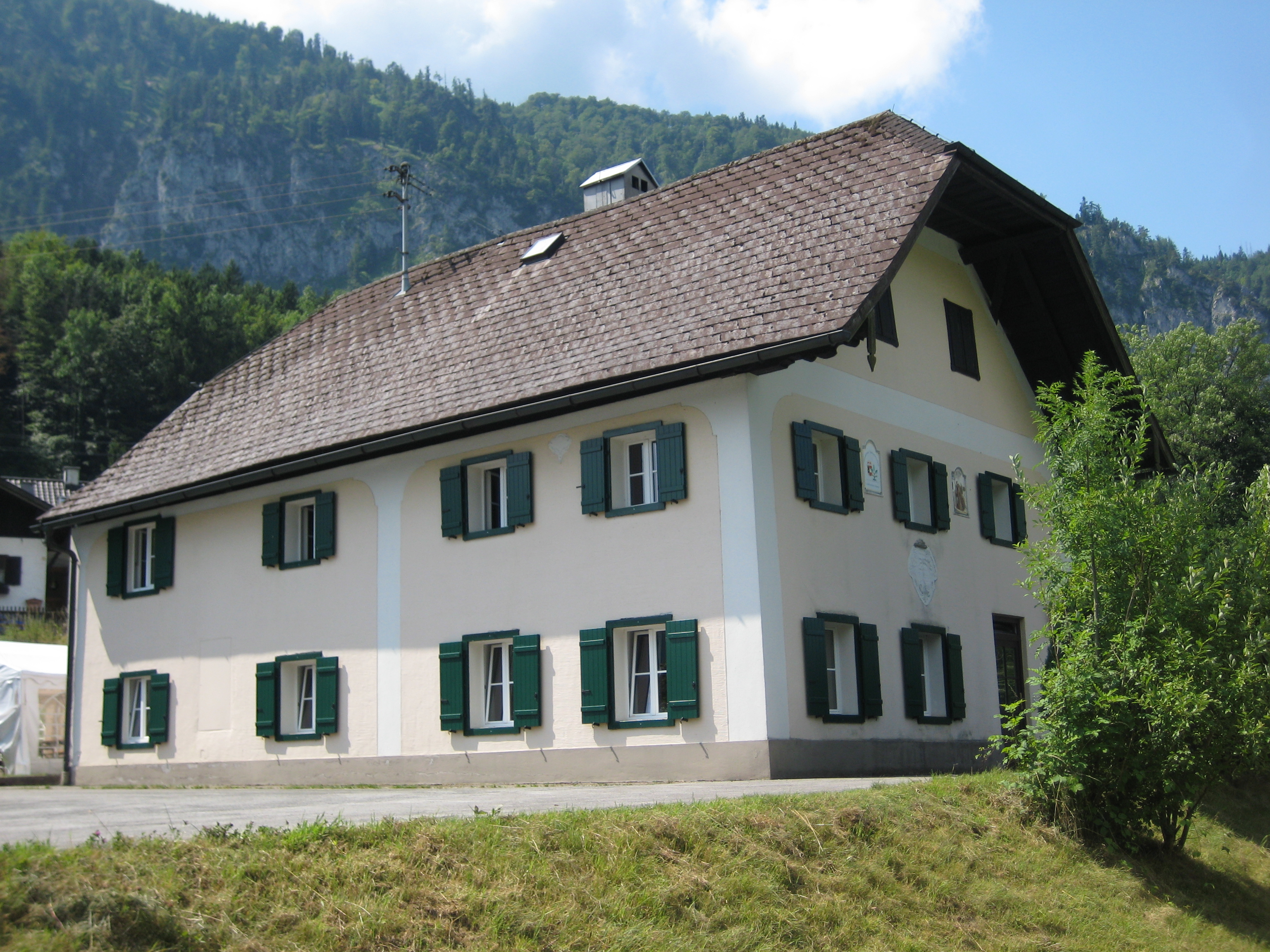 Ehem. Forsthaus, Oberburgau 1, St. Gilgen